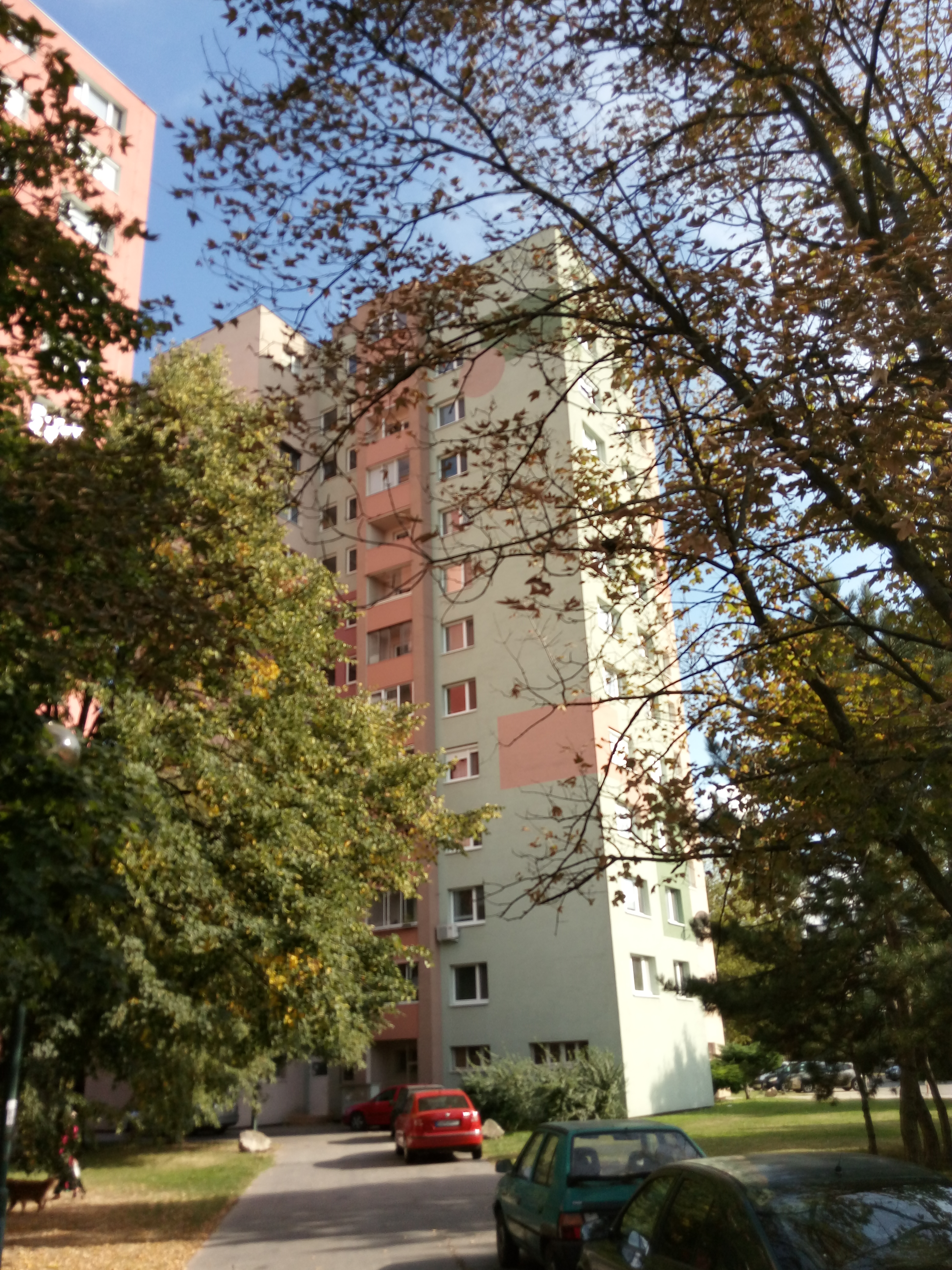 Čiernovodská 6, Vrakuňa, Bratislava